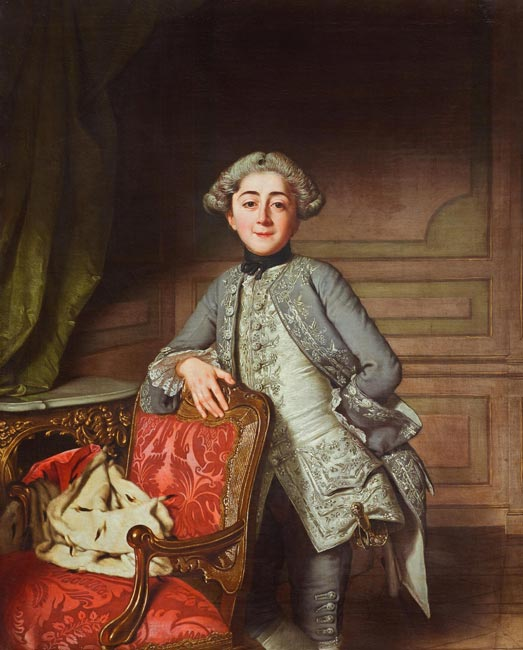 Kniebildnis des Prinzen Albert v. Anhalt-Dessau (1750-1811) als Kind hinter einem Stuhl stehend